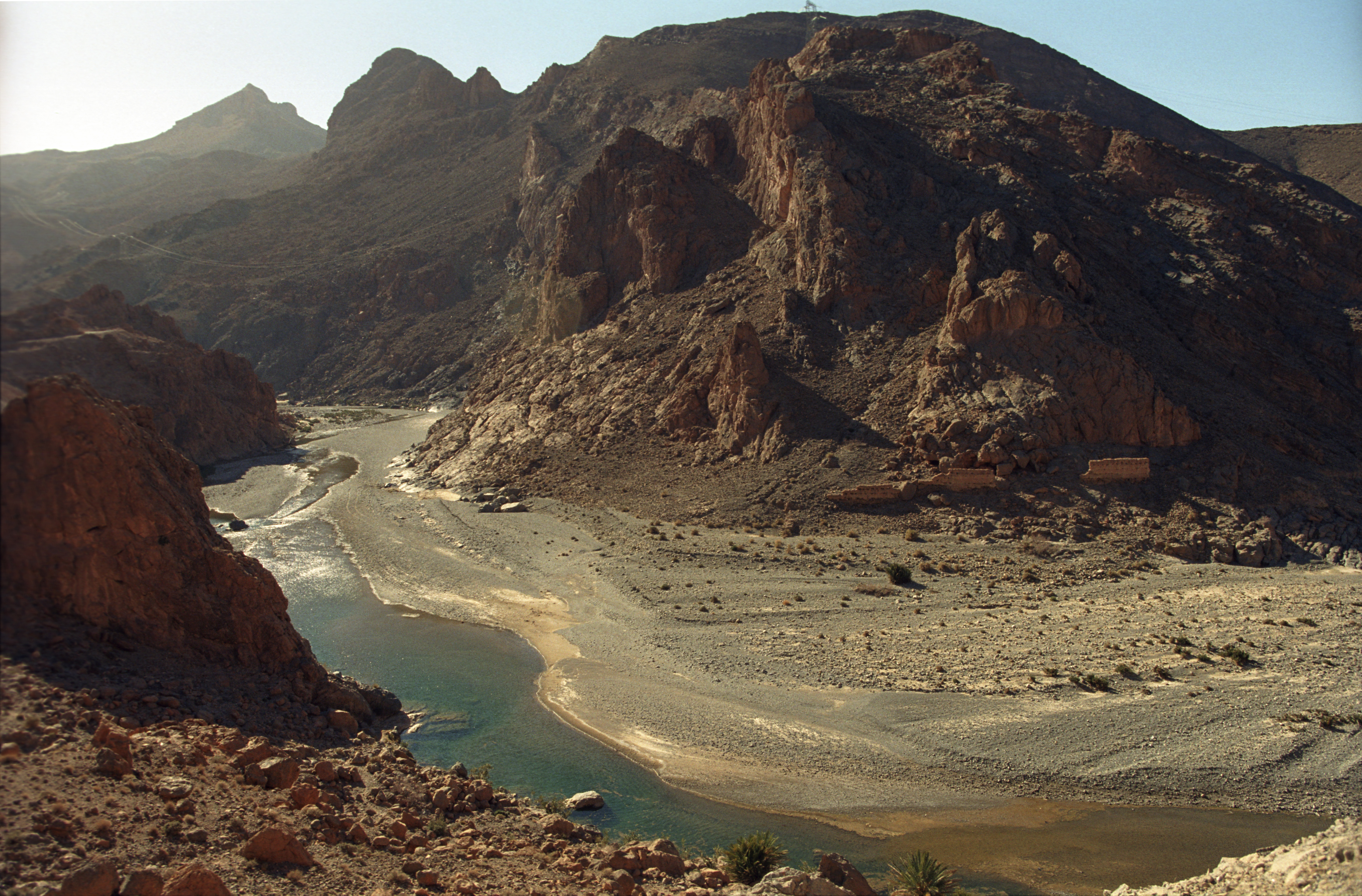 Ziz river, Morocco